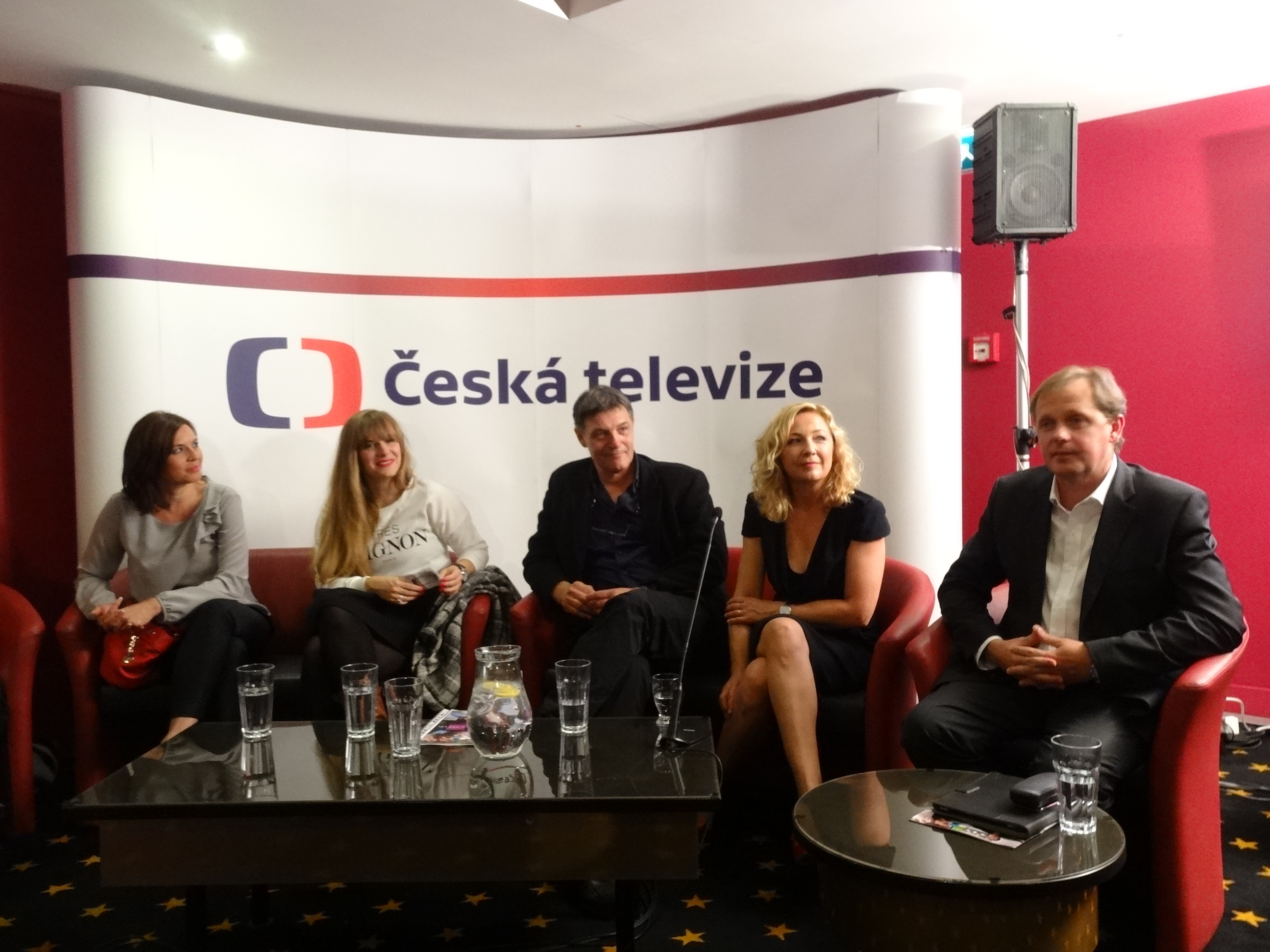 Fotky z novinářské konference z 26. srpna - Autor Lucie Borová pro & 10Mpix.cz